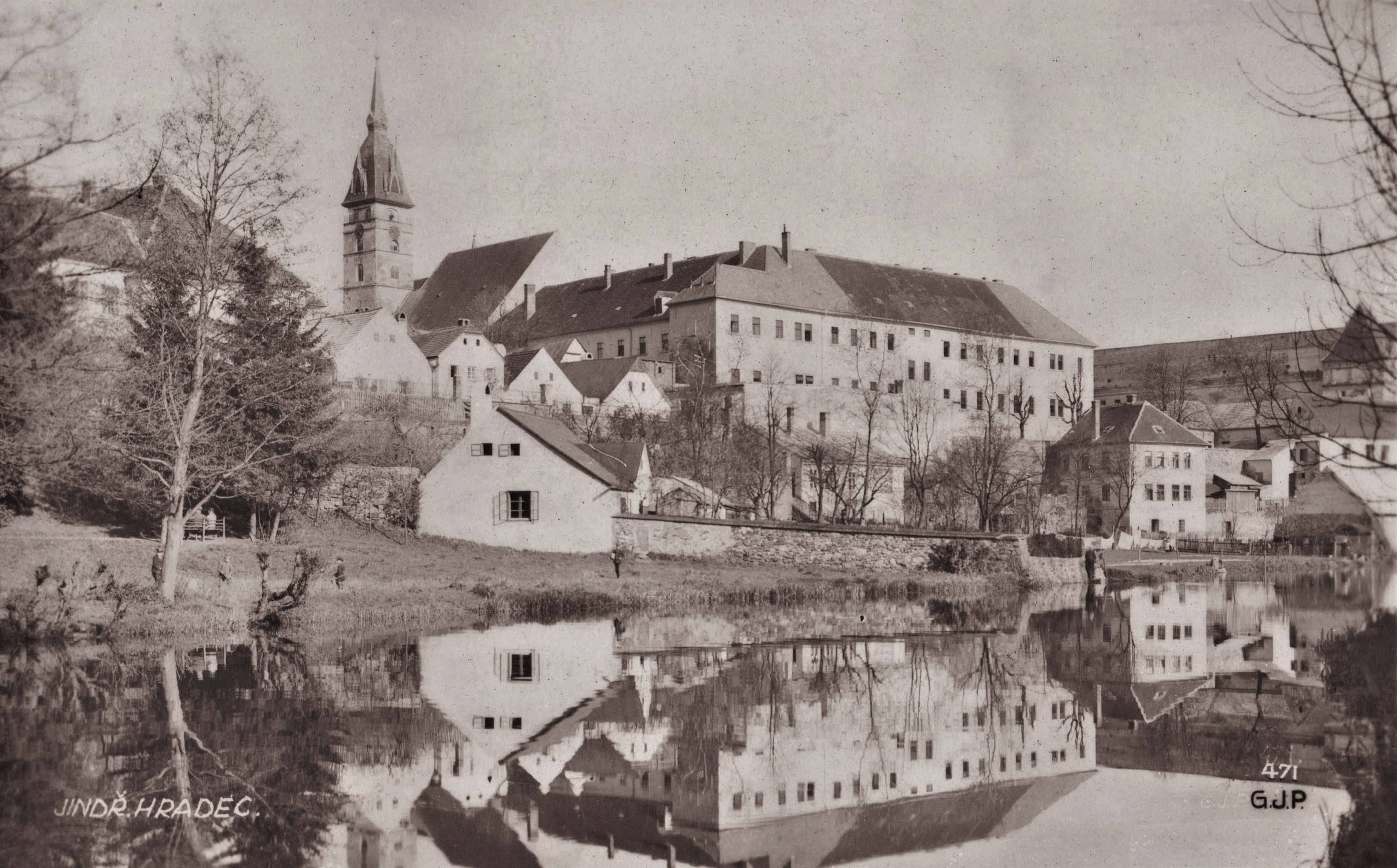 Merthův rodný dům na dobové pohlednici